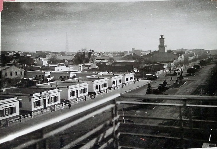 Barrio ferroviario y centro de Trelew a mediados de la década de 1950